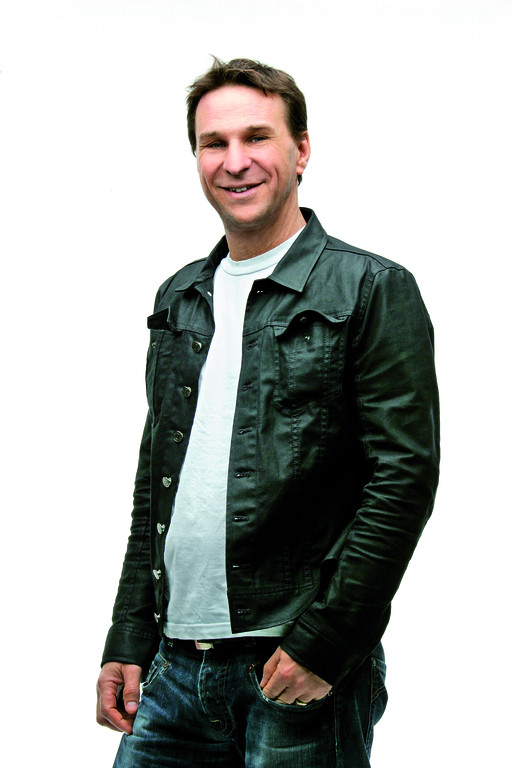 Programledaren Anders Lundin.